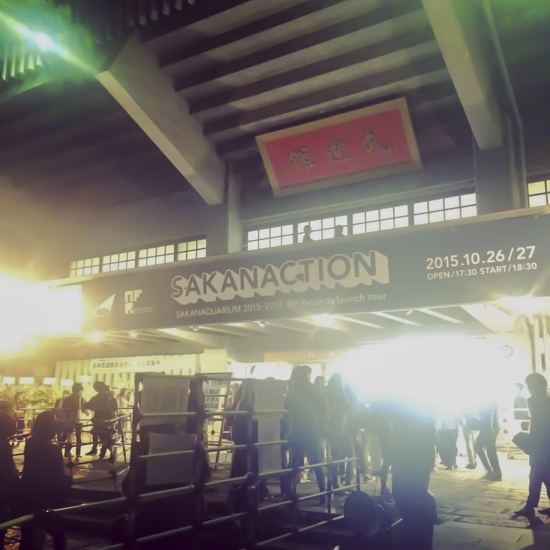 サカナクションの2015年から2016年にかけて行われたライブツアーの会場（日本武道館）入り口。